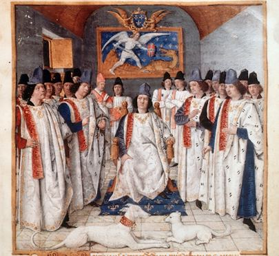 Illustratie uit de 15e eeuw Zie ook thumb|left